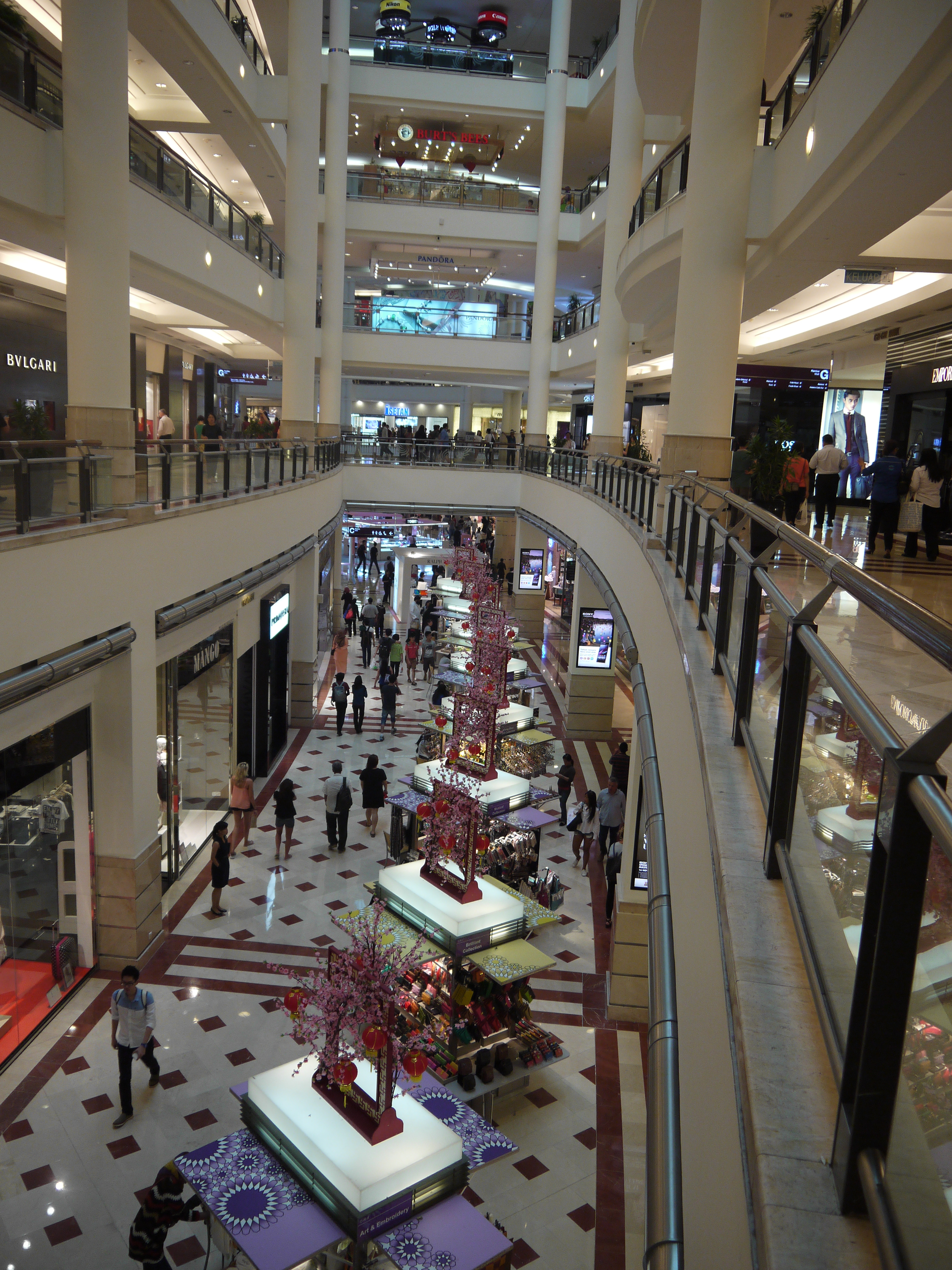 Suria KLCC interior